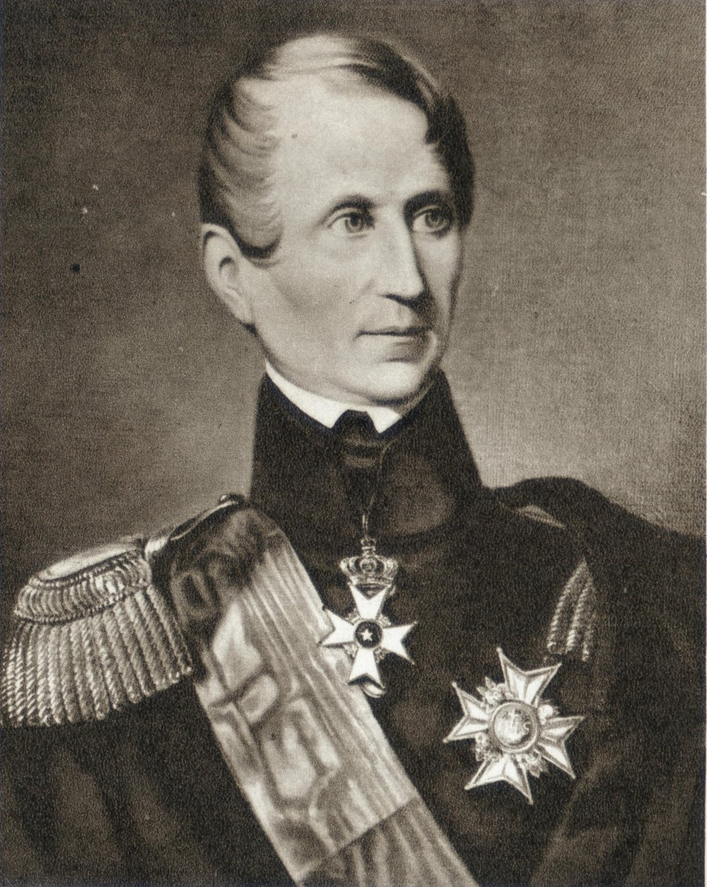 Arvid Mauritz Posse (1792-1850), ämbetsman, statsråd, landshövding. Oljemålning av Johan Gustaf Sandberg 1845